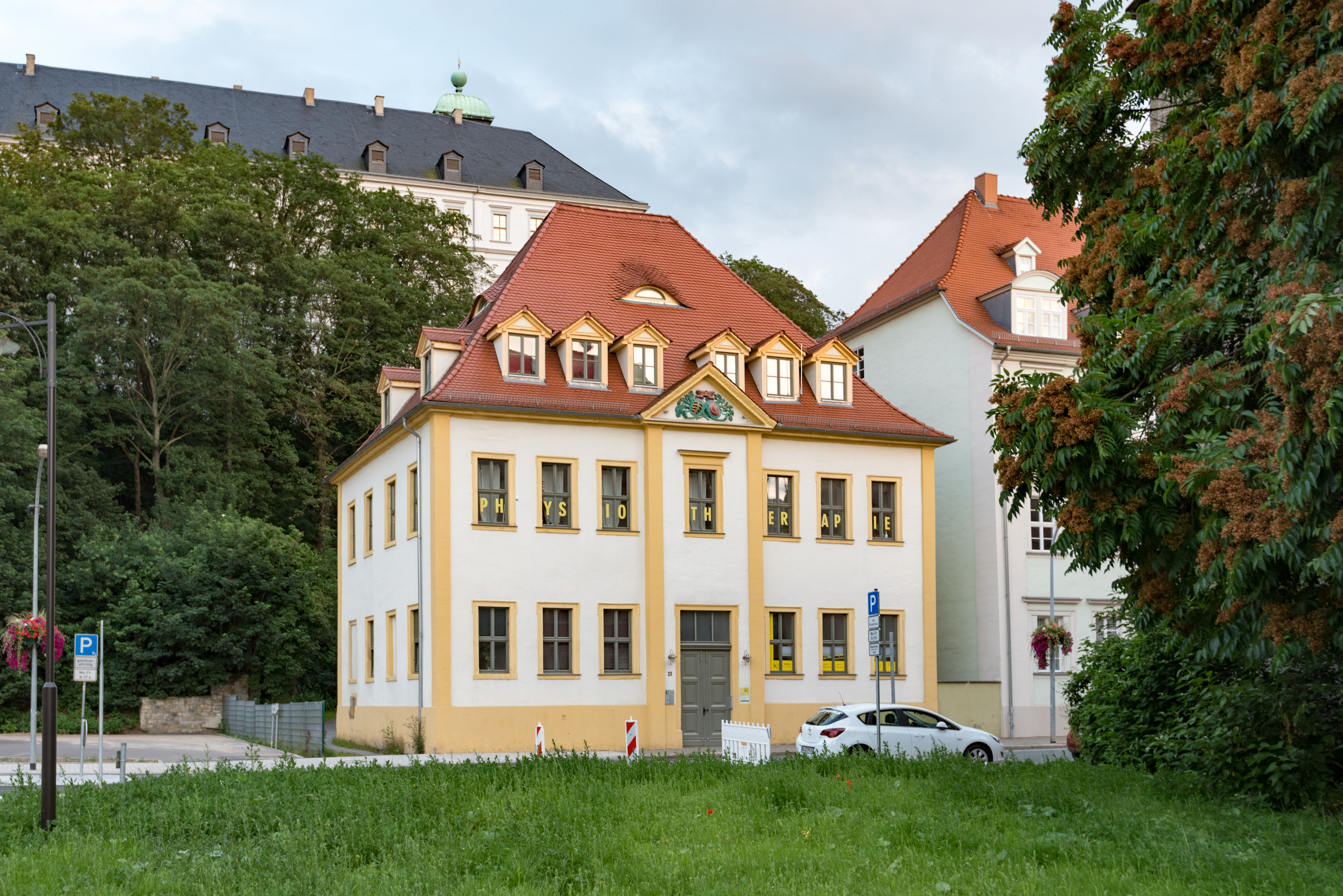 Weißenfels, Leipziger Straße 13